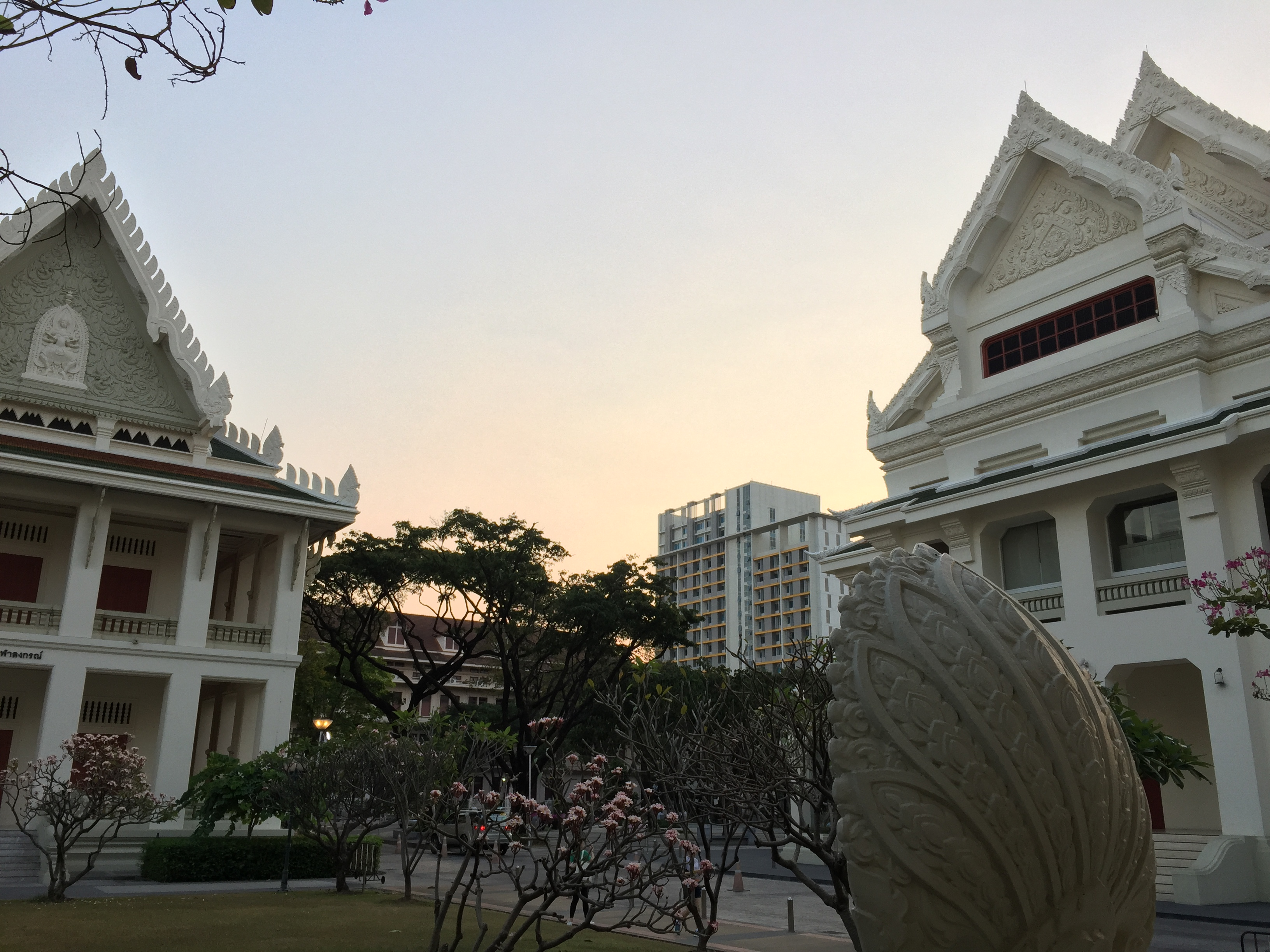 (ซ้าย)อาคารมหาจุฬาลงกรณ์เป็นอาคารเรียนหลังแรกของจุฬาฯ (ขวา)หอประชุมจุฬาลงกรณ์มหาวิทยาลัย (กลางซ้าย)อาคารวิศวกรรมศาสตร์ 3 (กลางขวา)อาคารมหาวชิรุณหิศ